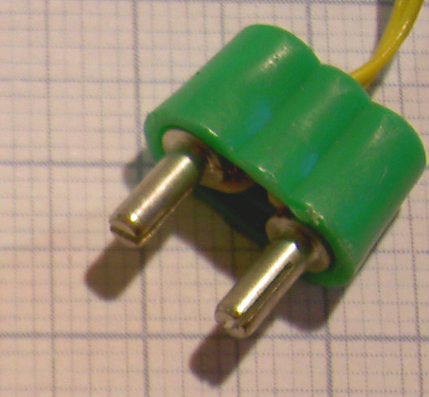 Schwachstrom-Stecker für Puppenhäuser